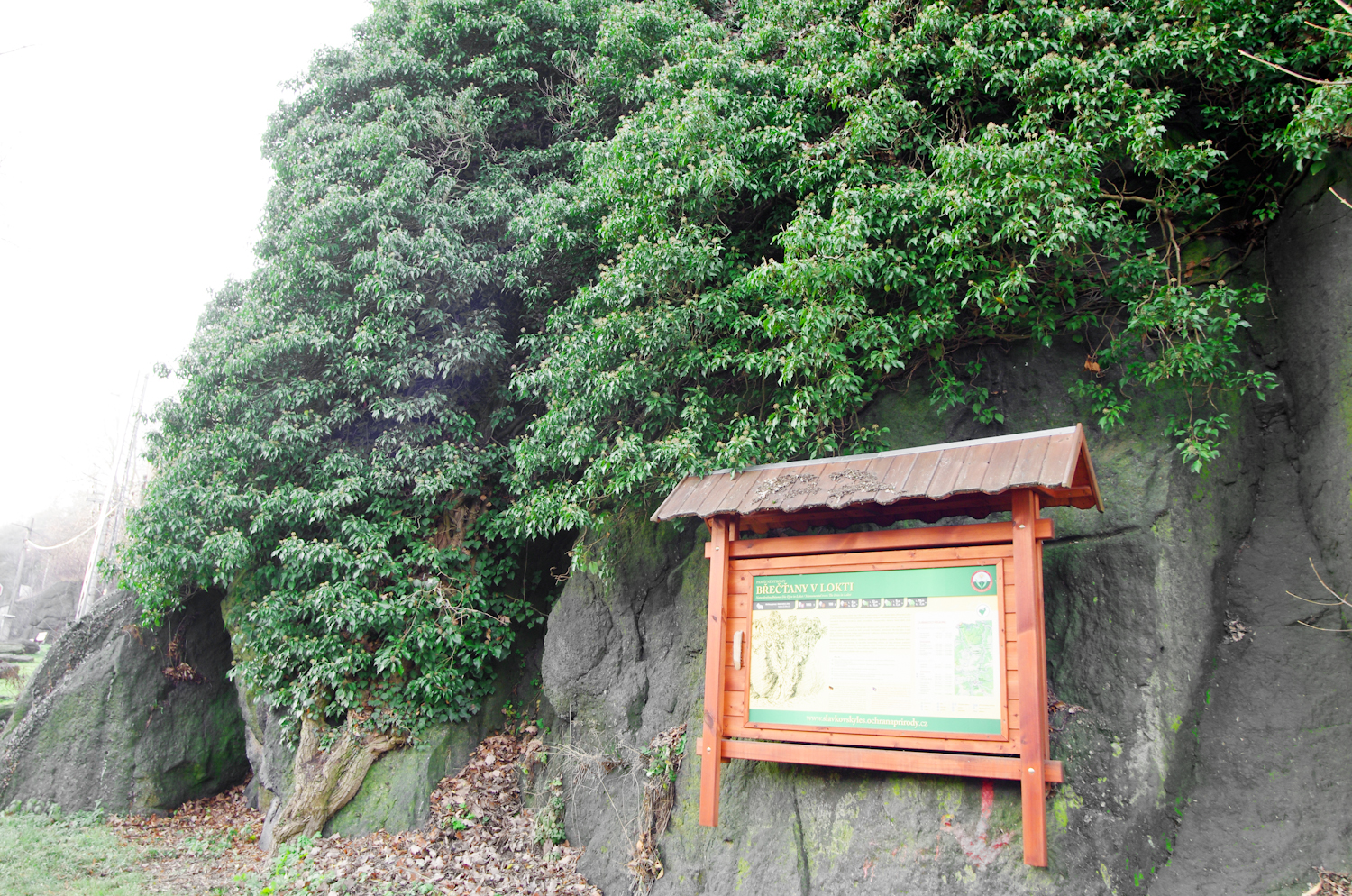 Loket, okres Sokolov, památné stromy - dva staré plodné břečťany v Lokti. Bohatě rozvětvené kmínky vytvářejí na tmavé skále krásný ornamentní reliéf.